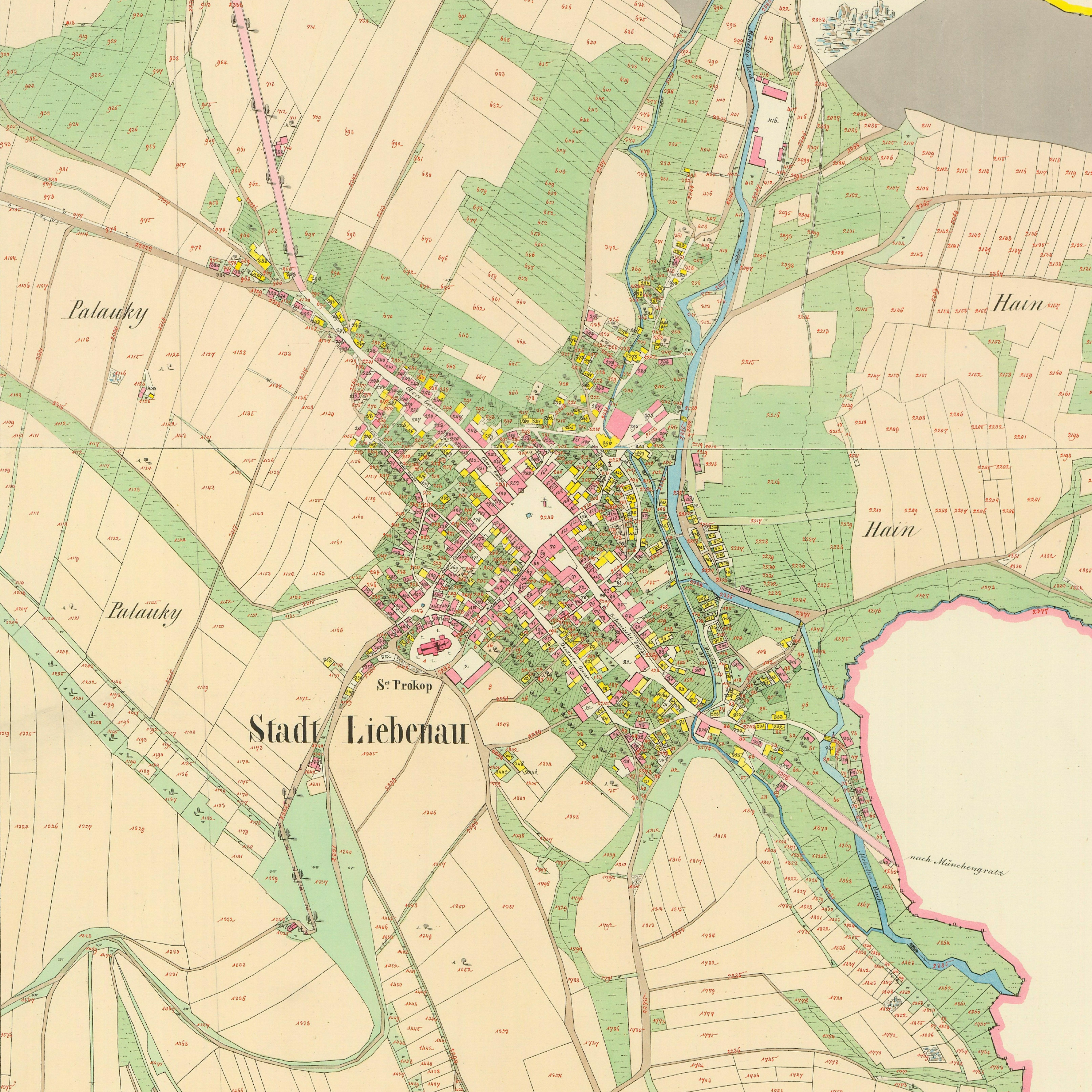 Hodkovice nad Mohelkou na císařských otiscích map Stabilního katastru z roku 1843 (Výřez z mapových listů kód 1883-1-003 a 1883-1-003)